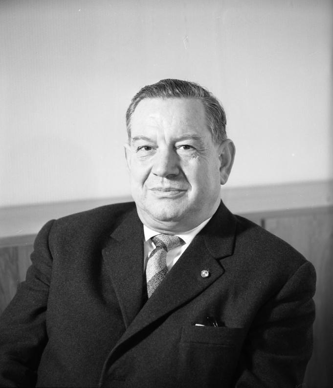 13.2.1963 Portrait des Bayrischen Ministerpräsidenten Alfons Goppel